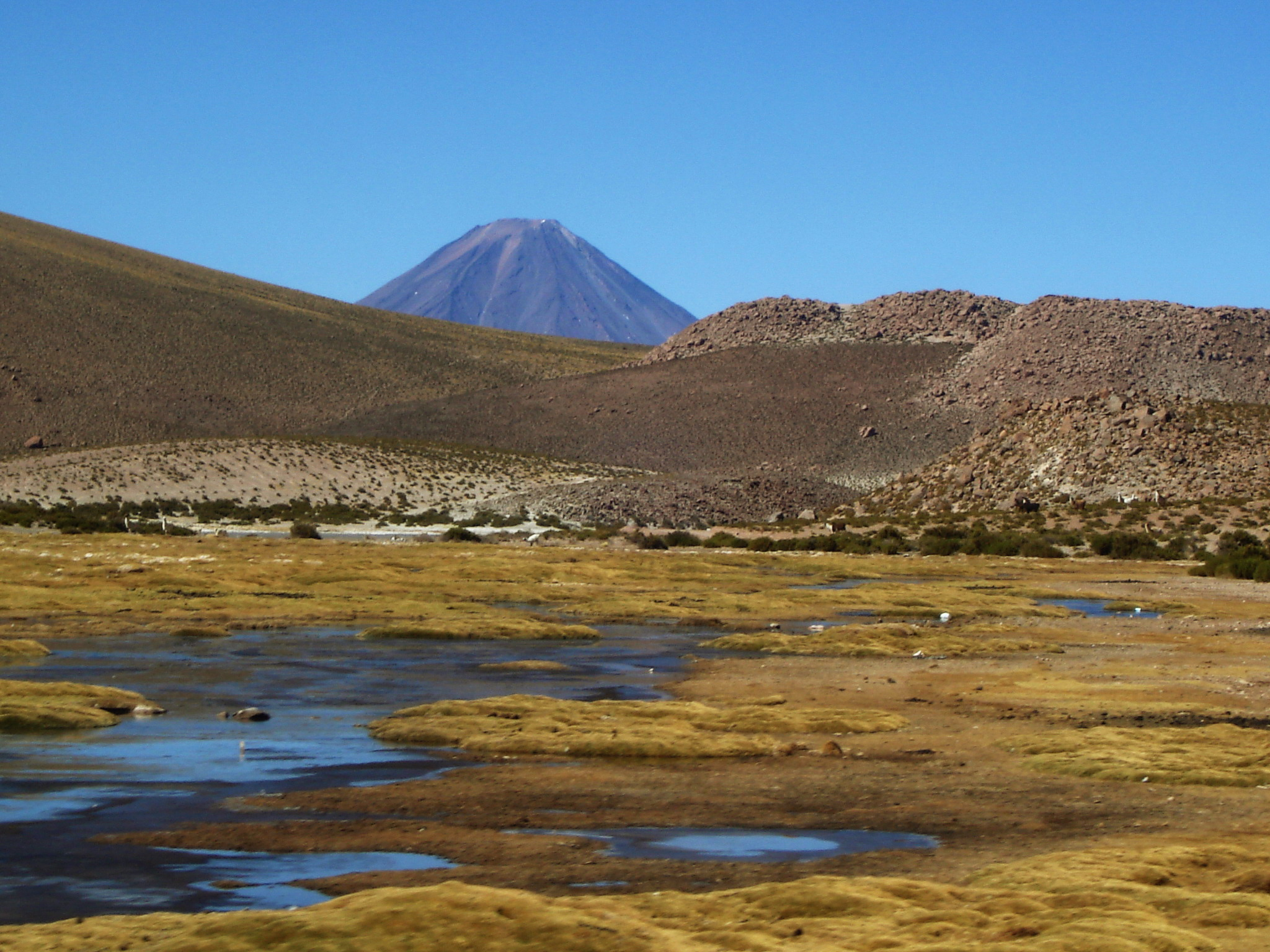 Altiplano chilien